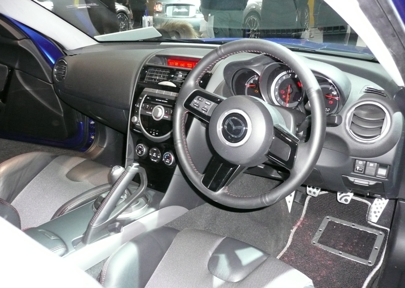 Mazda RX-8 binterior.